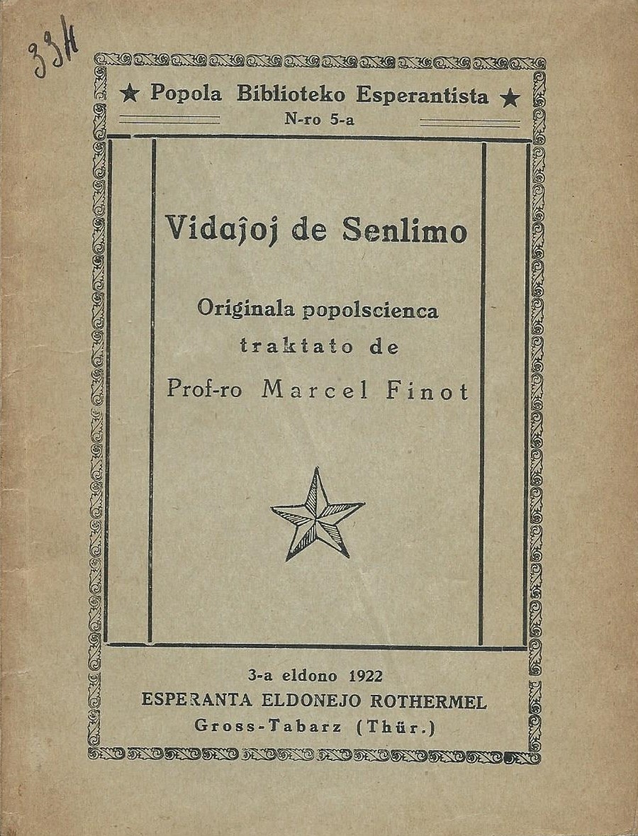 Vidajhoj de Senlimo, 1922